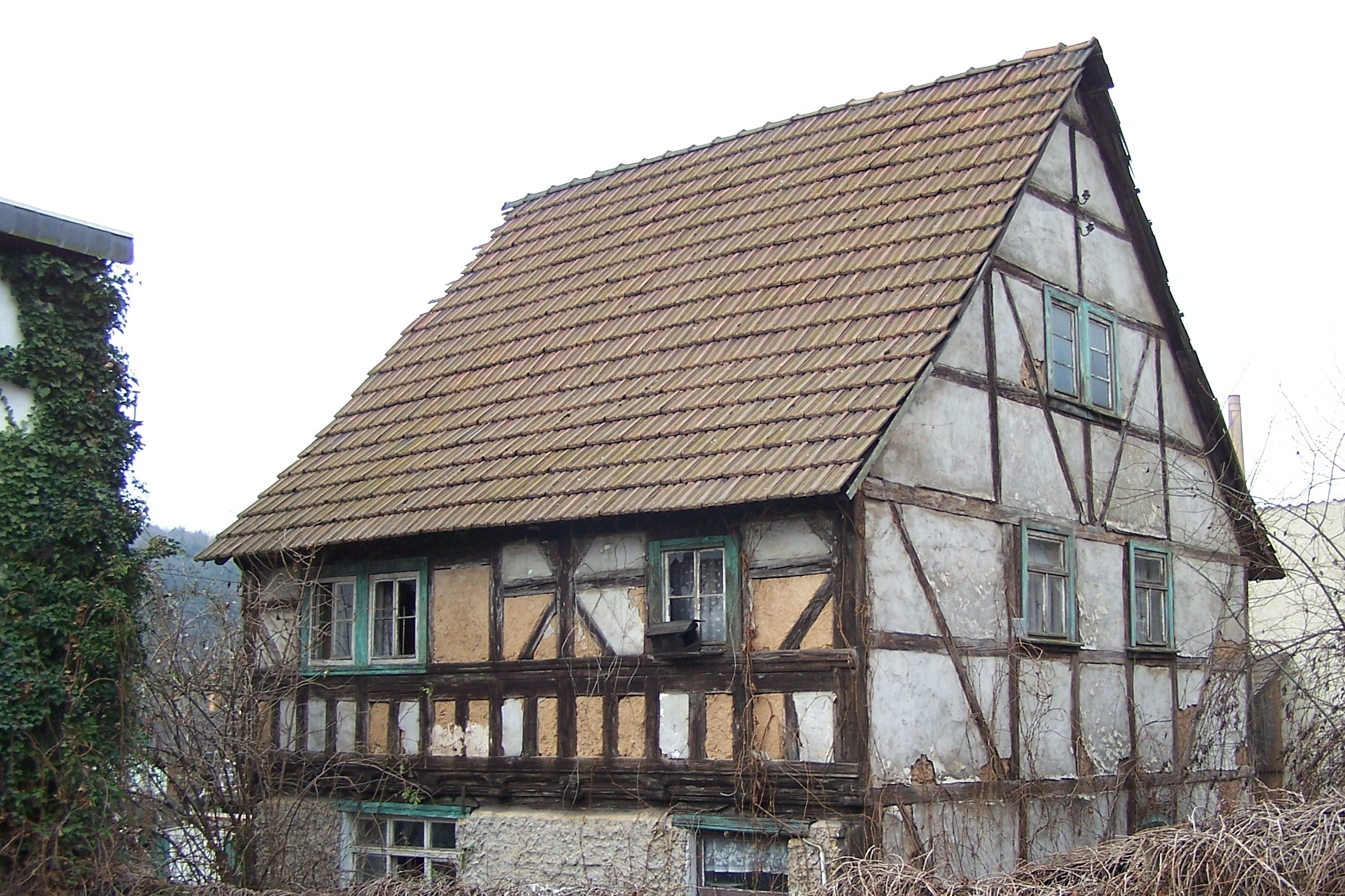 Das einst malerische kleine Fachwerkhaus in der Gothaer Straße 92 gegenüber dem Fischbacher Schlößchen ist ein Baudenkmal der Wartburgstadt.